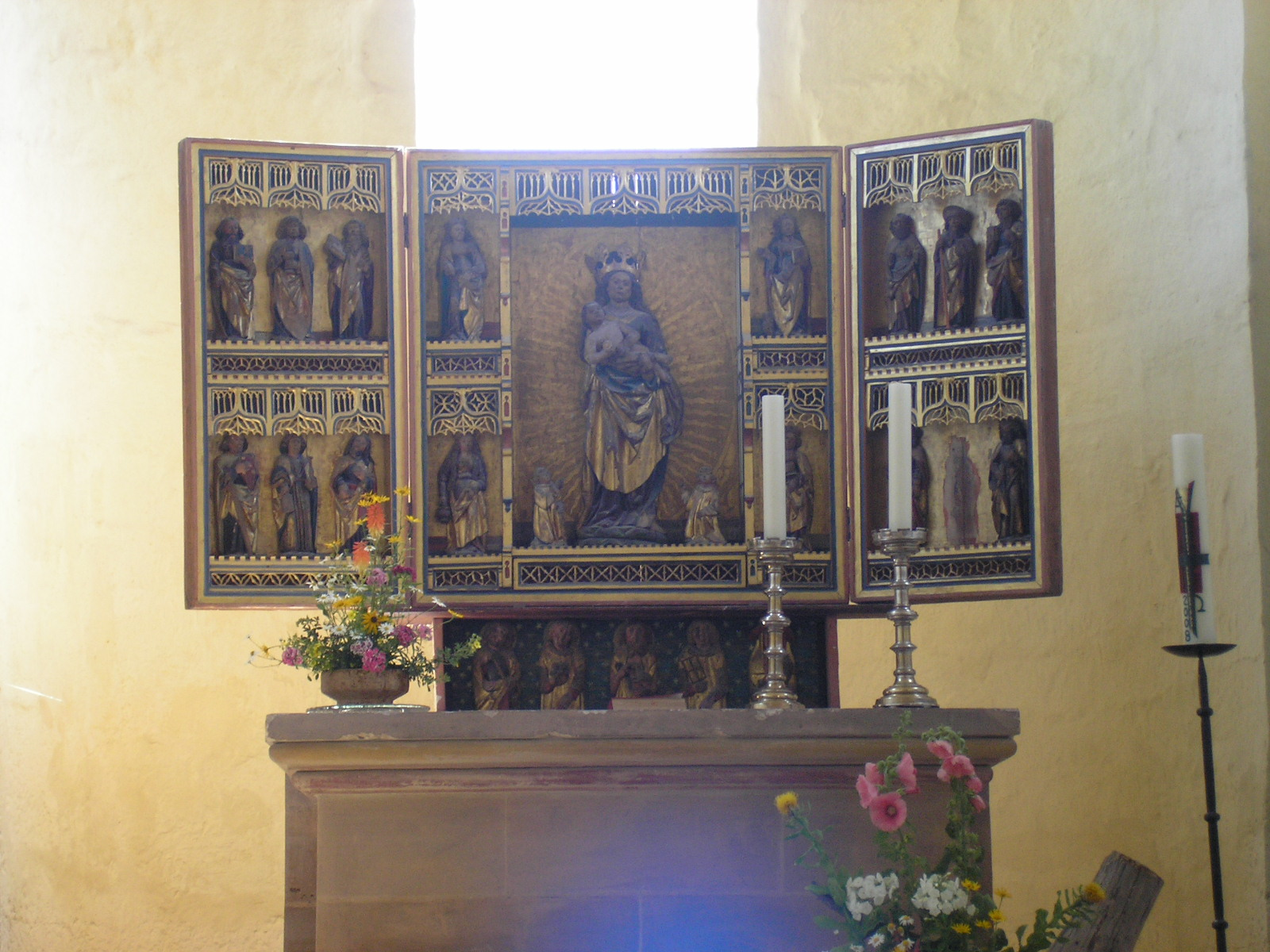 Der Marienaltar der Klosterkirche Münchenlohra (Thüringen).